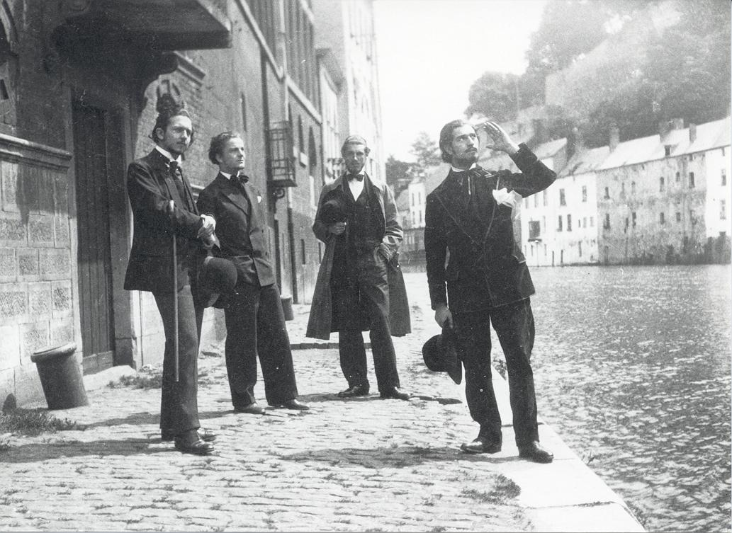 Photo groupe, Groffier, X., Léon van Dievoet, Carlo Lambert